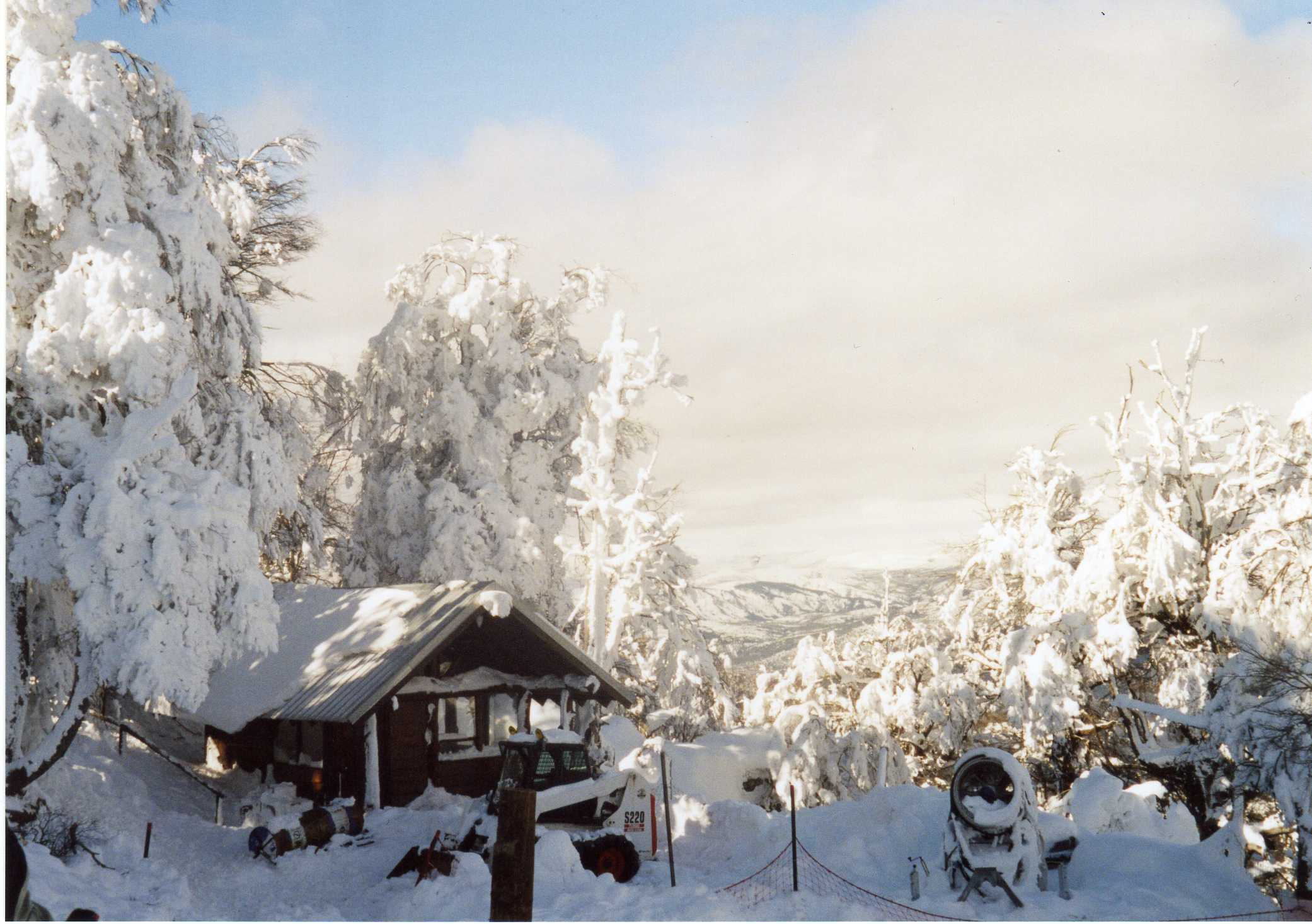 Cabaña cubierta de nieve en el Cerro Otto, Bariloche, Patagonia Argentina.